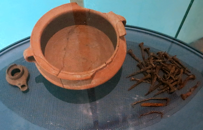 Yigal Allon Center - Yigal Alon Museum, Kibbutz Ginnosar, Sea of the Galilee, Israel בית יגאל אלון